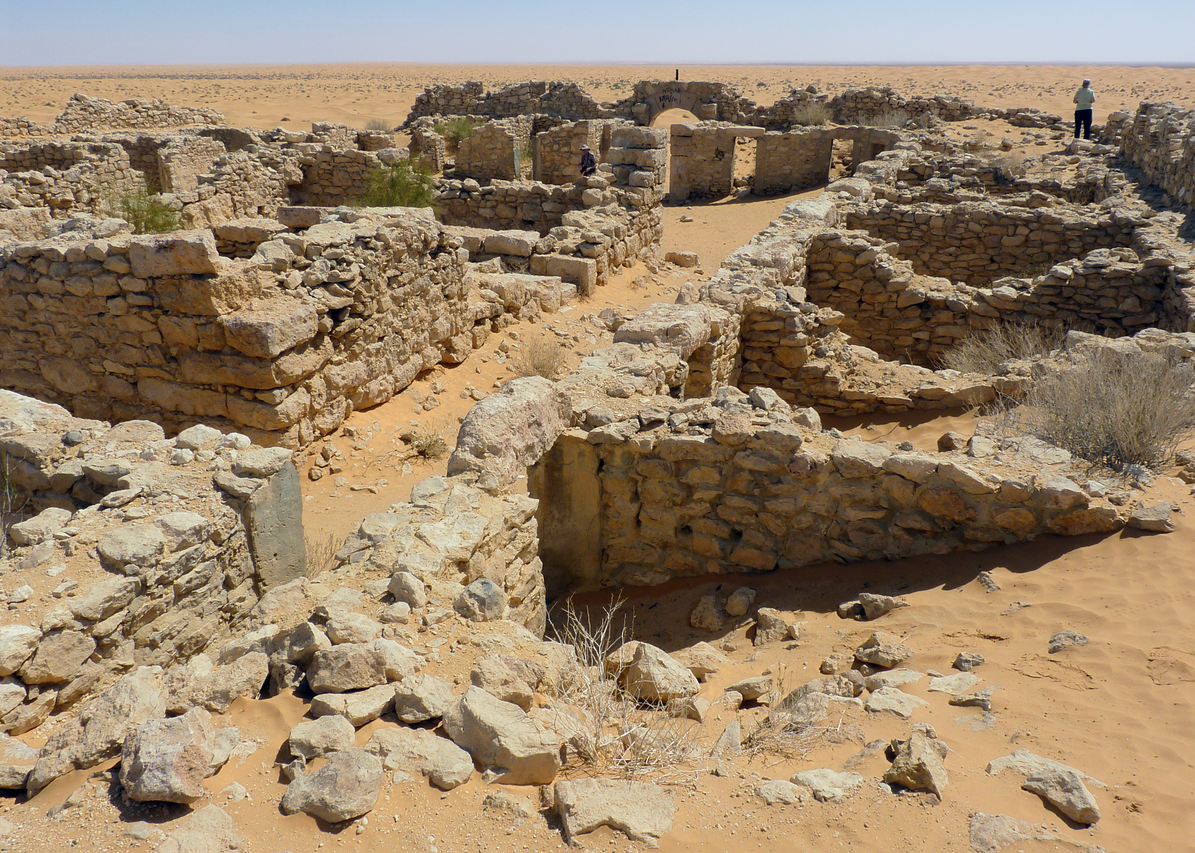 Das mittelkaiserzeitliche römische Kleinkastell Tisavar am tripolitanischen Limes, nördlich der Oase Ksar Rhilane/Ksar Ghilane/Ksar Ghelane am Rand des Östlichen Großen Erg in Tunesien.